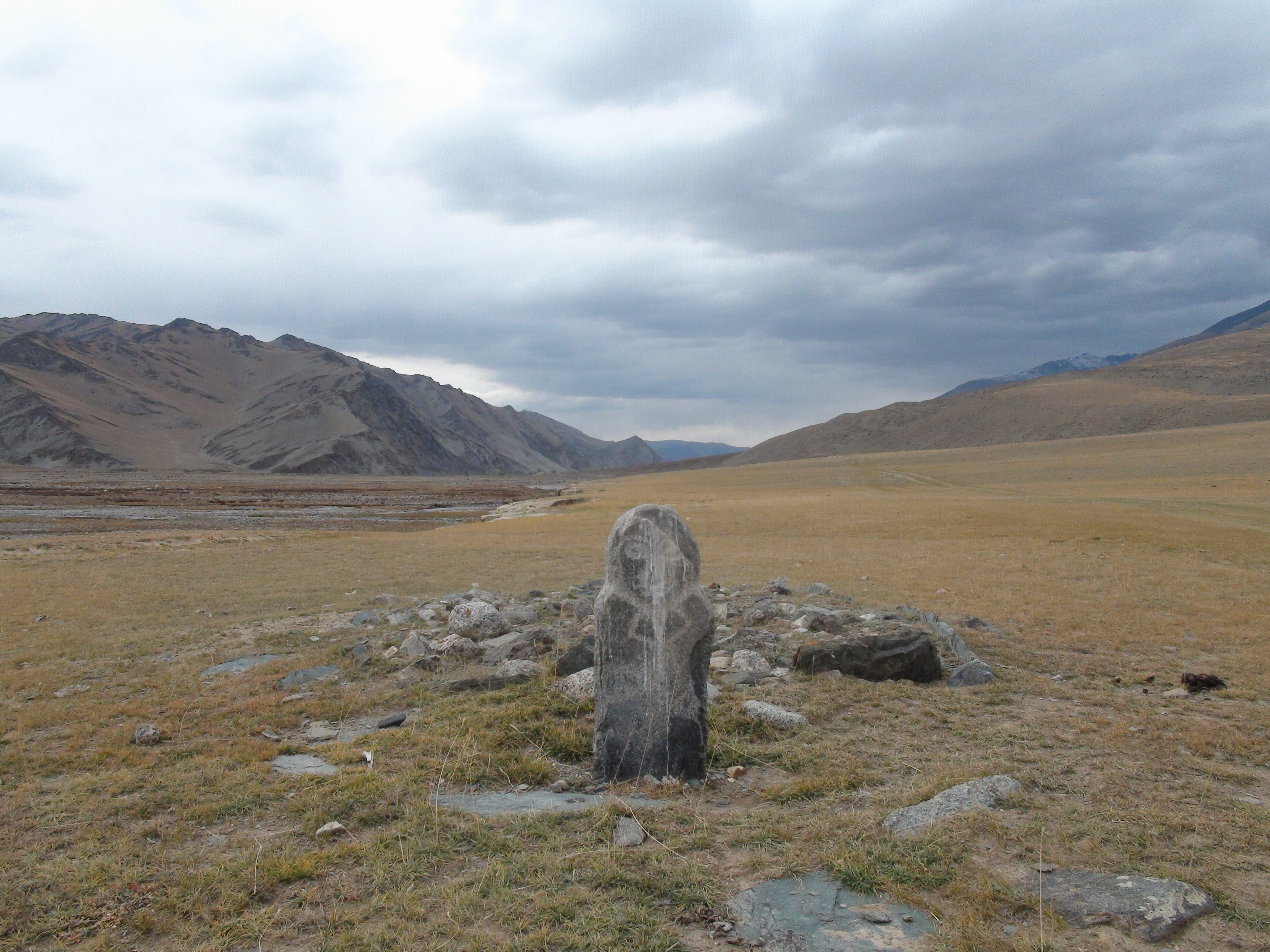 Balbal at Munkh-Khairkhan mount